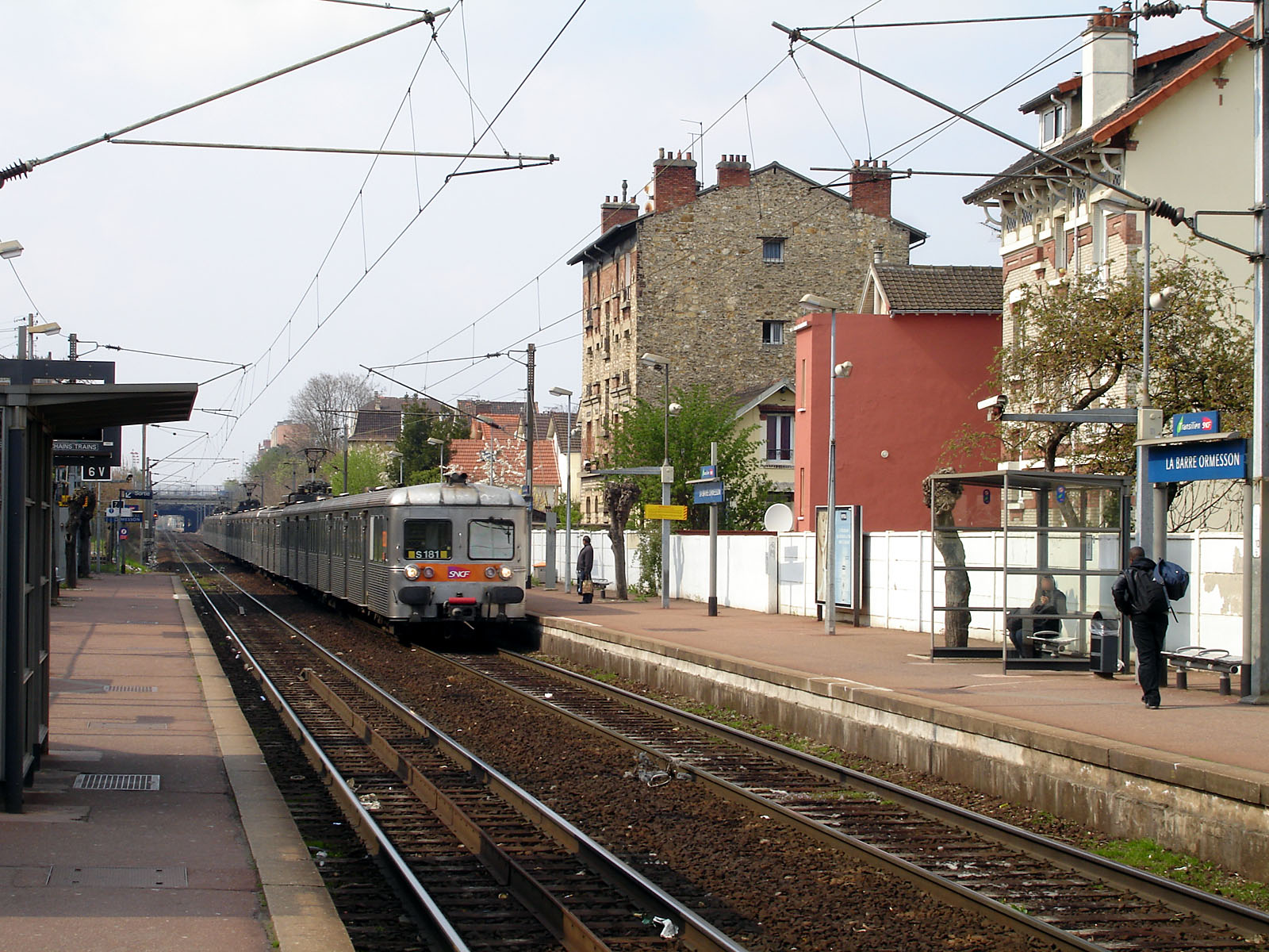 La gare de La Barre - Ormesson, à Deuil-la-Barre, Val-d'Oise, France.